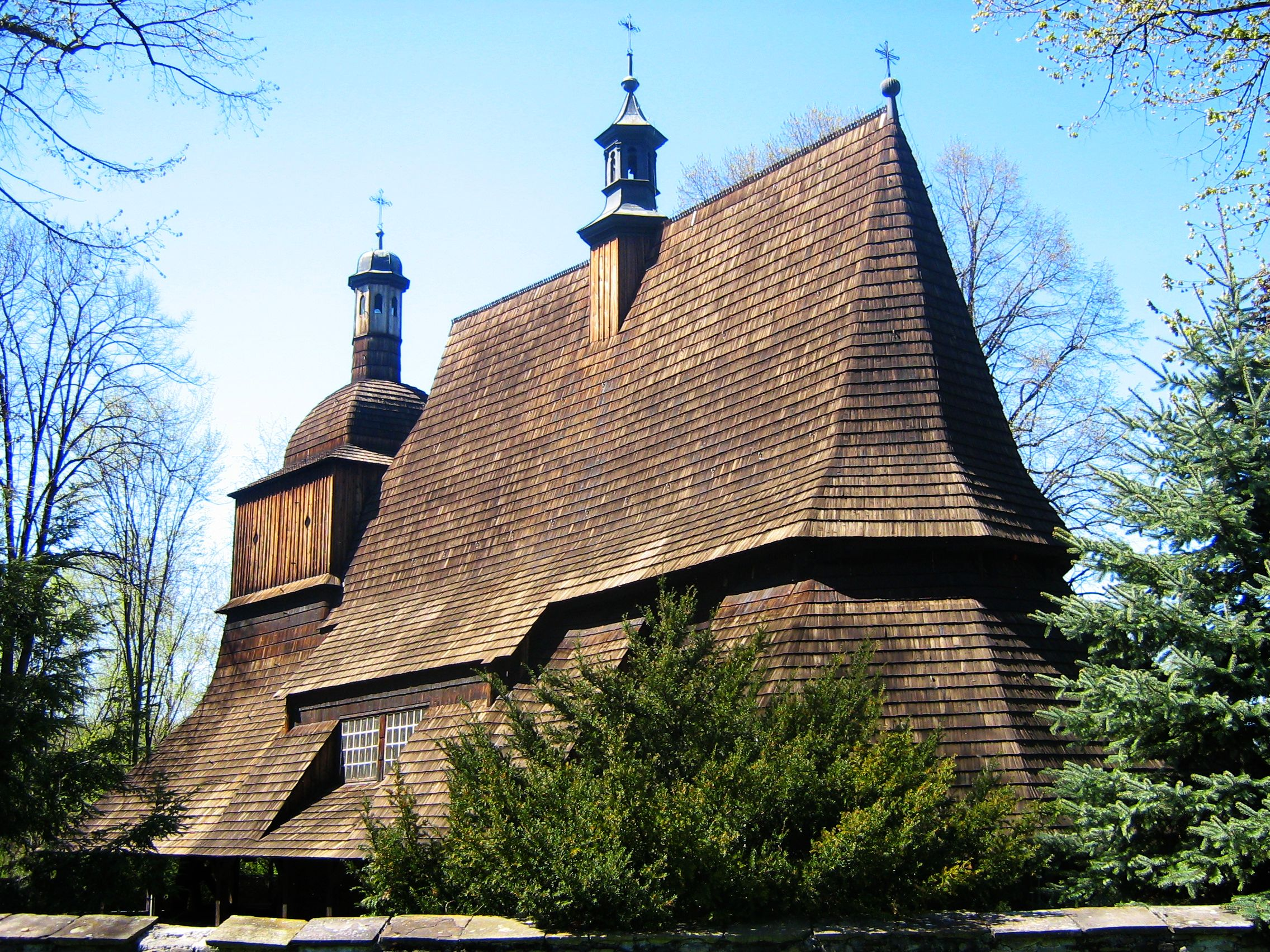 Drewniany kościół w Sękowej, wpisany na listę UNESCO